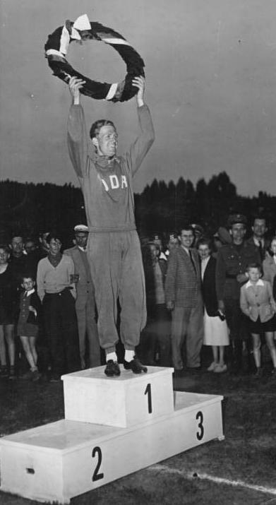 VIII. Friedensfahrt, Gustav-Adolf Schur Zentralbild CAF-V Bey-Ho 18.5.1955 - VIII. Internationale Radfernfahrt Prag-Berlin-Warschau. UBz: Der strahlende Gesamt-Einzelsieger, "TÜWO" Schur (DDR), der seinen Siegerkranz hochschwenkt.